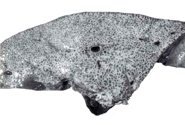 Laboratório de Patologia Animal, Departamento de Clínica e Patologia, Centro de Ciências Agroveterinárias (CAV), Universidade do Estado de Santa Catarina (UDESC), Av. Luiz de Camões 2090, Bairro Conta Dinheiro, Lages, SC 88520-000, Brasil IIMédico Veterinário, Cooperativa de Produtores Rurais de Urubici, Av. Rodolfo Andermann 2580, Urubici, SC 88650-000, Brasil